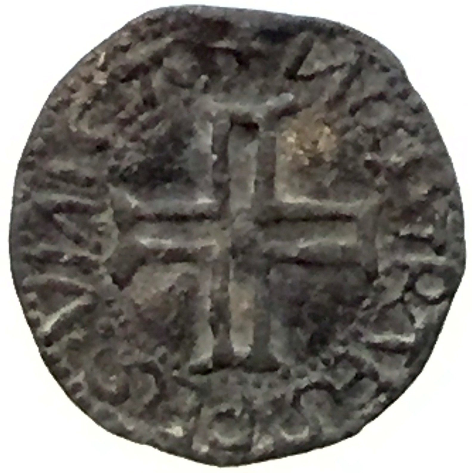 Moneda de la colonia portuguesa de Malaca acuñada durante el reinado de Manuel I, entre 1505 y 1521. Se llamaba 'soldo' (sueldo) y equivalía a 6 reales portugueses. Colección del Museo do Dinheiro de Lisboa.